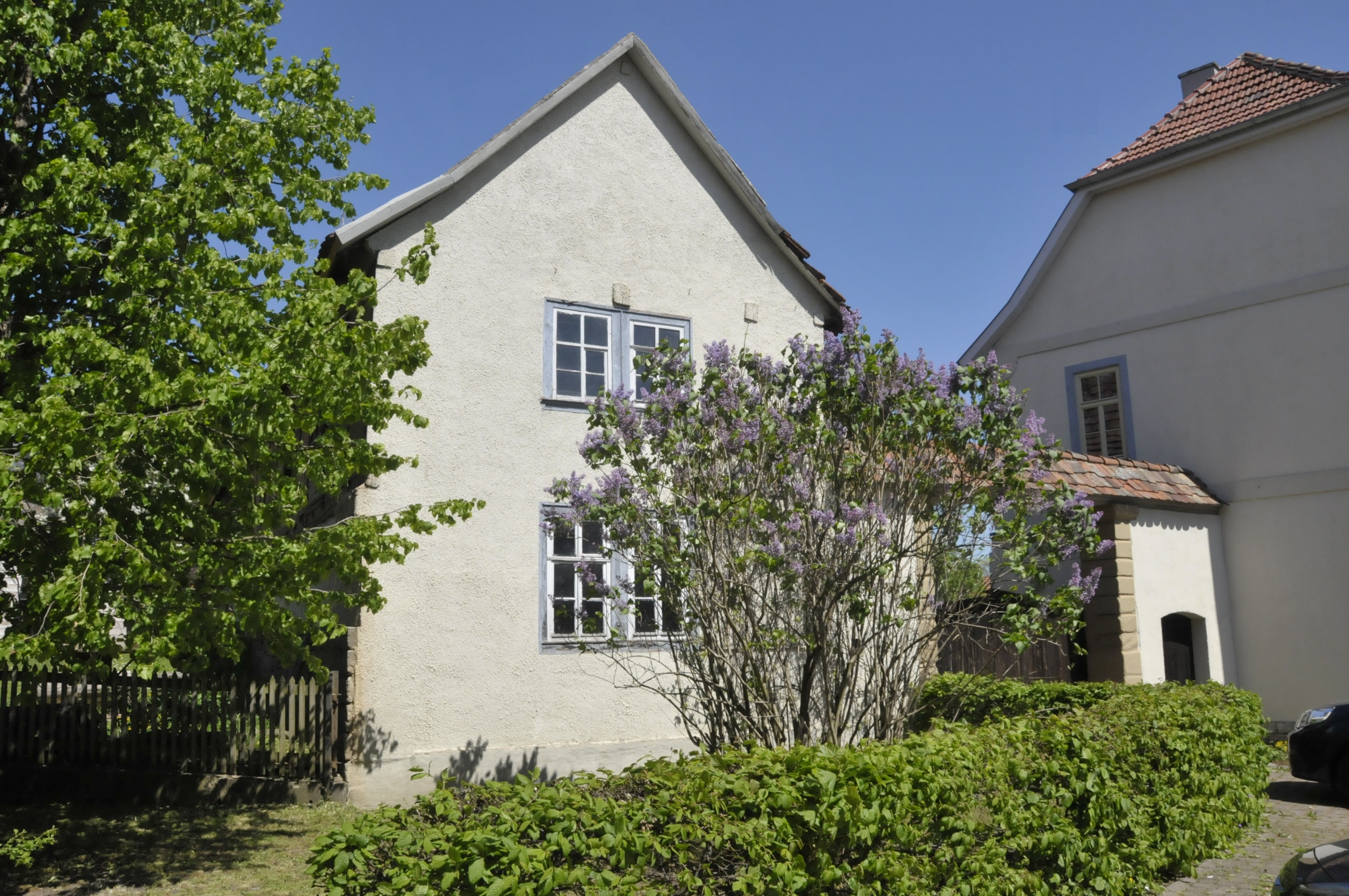 Udestedt, Schulplatz 5, ehem. Kantoratsgebäude